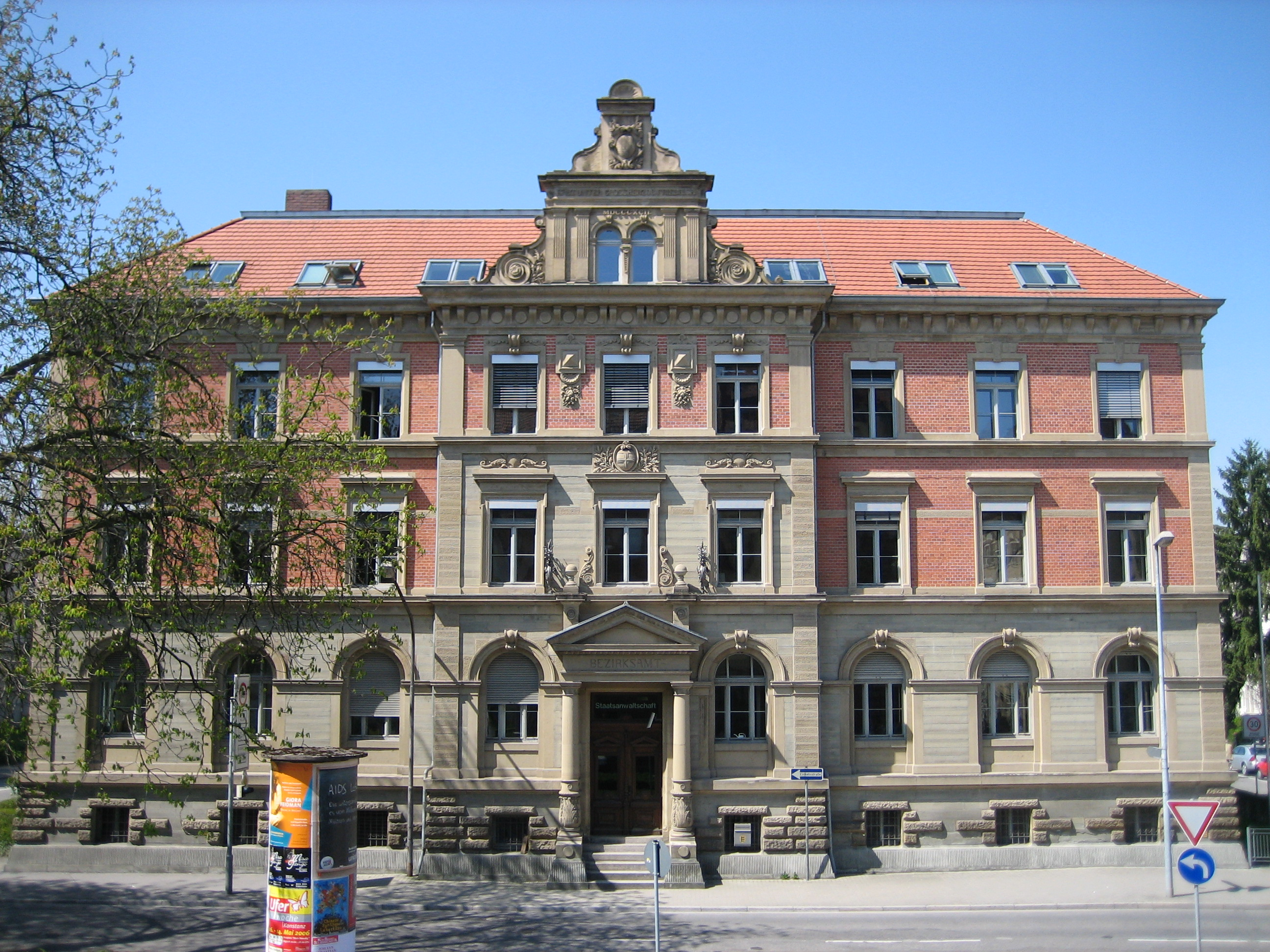 Sitz der Staatsanwaltschaft Konstanz in D-78462 Konstanz, Untere Laube 36. Frueheres Bezirksamt (Landratsamt)